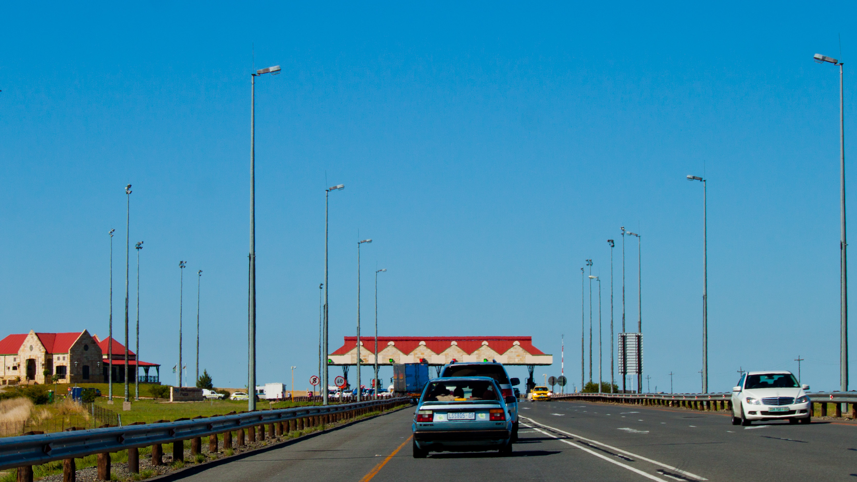 Verkeerdevlei Toll